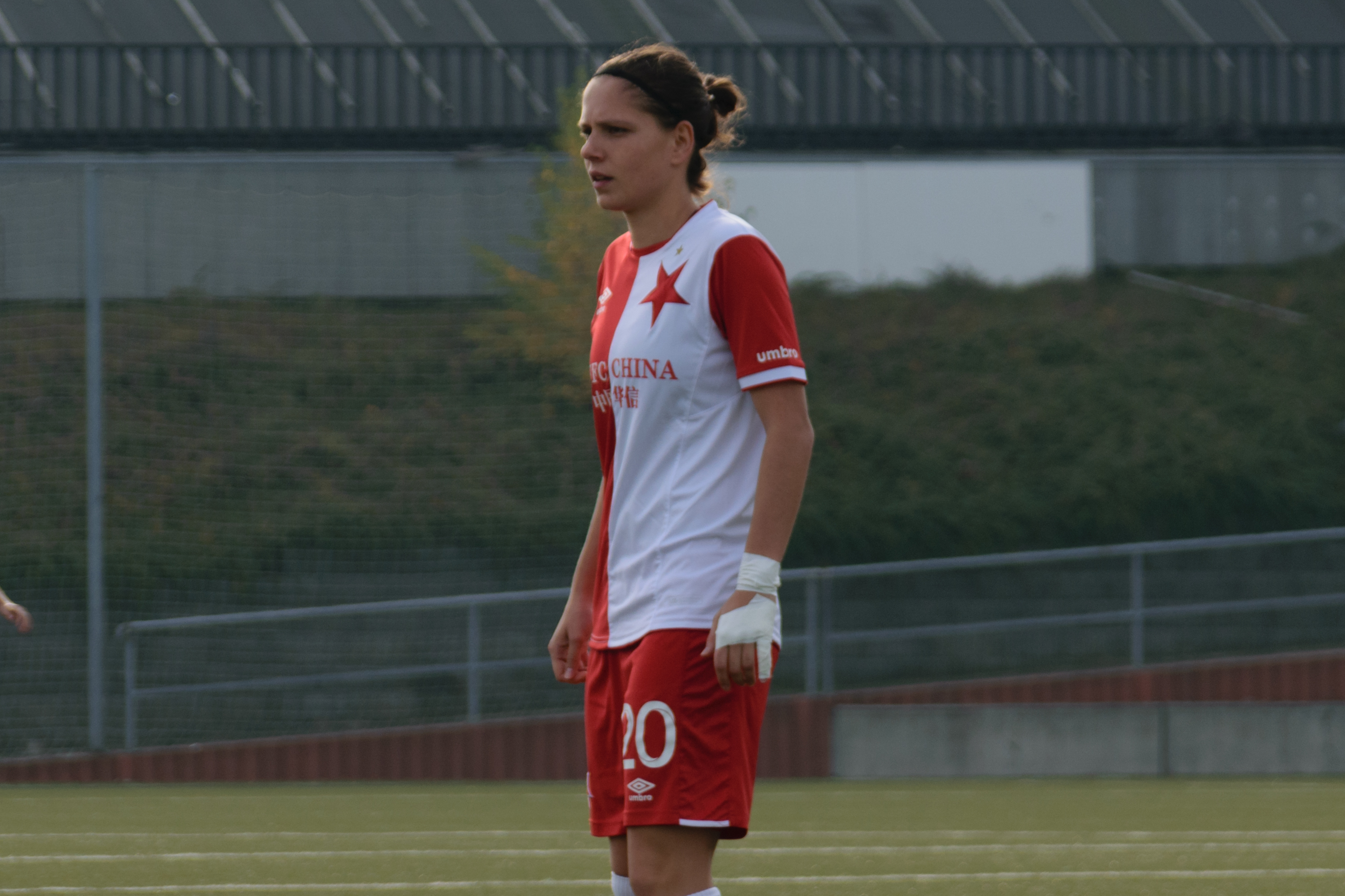 Diana Bartovičová